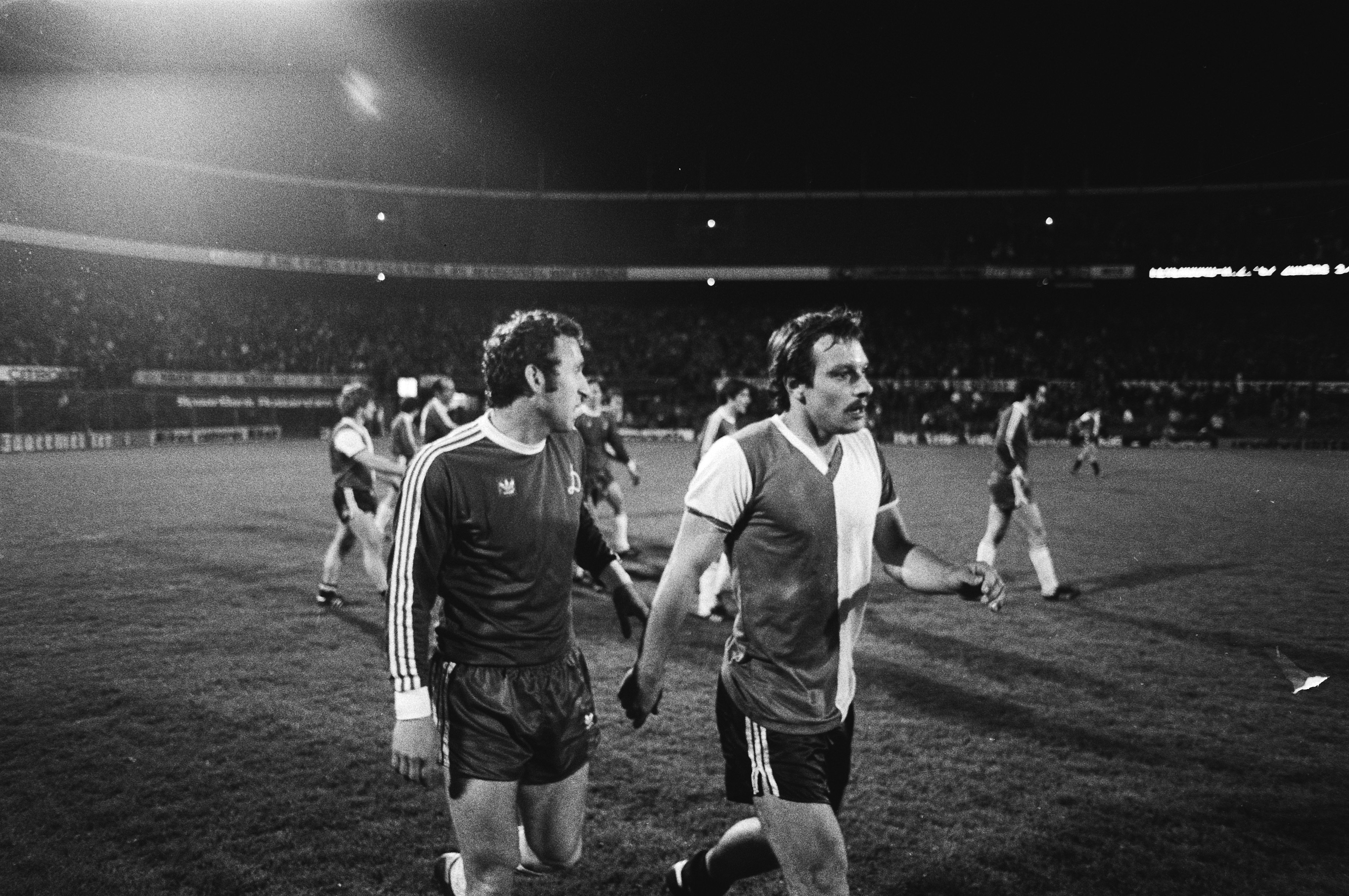 Feyenoord tegen Dynamo Tiflis 2-0 (Europacup-II), spelers verlaten het veld